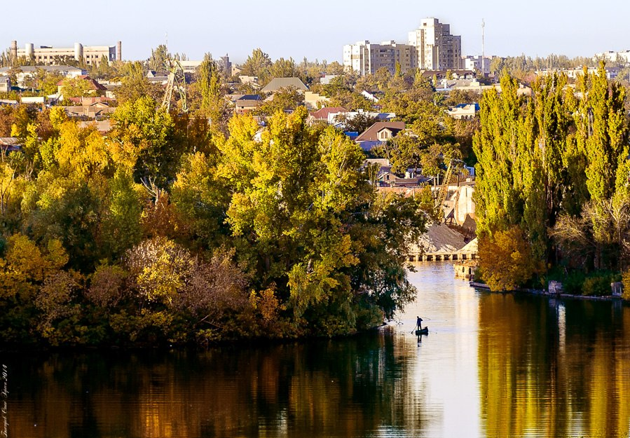 Вид на р. Кошевая в сторону центра